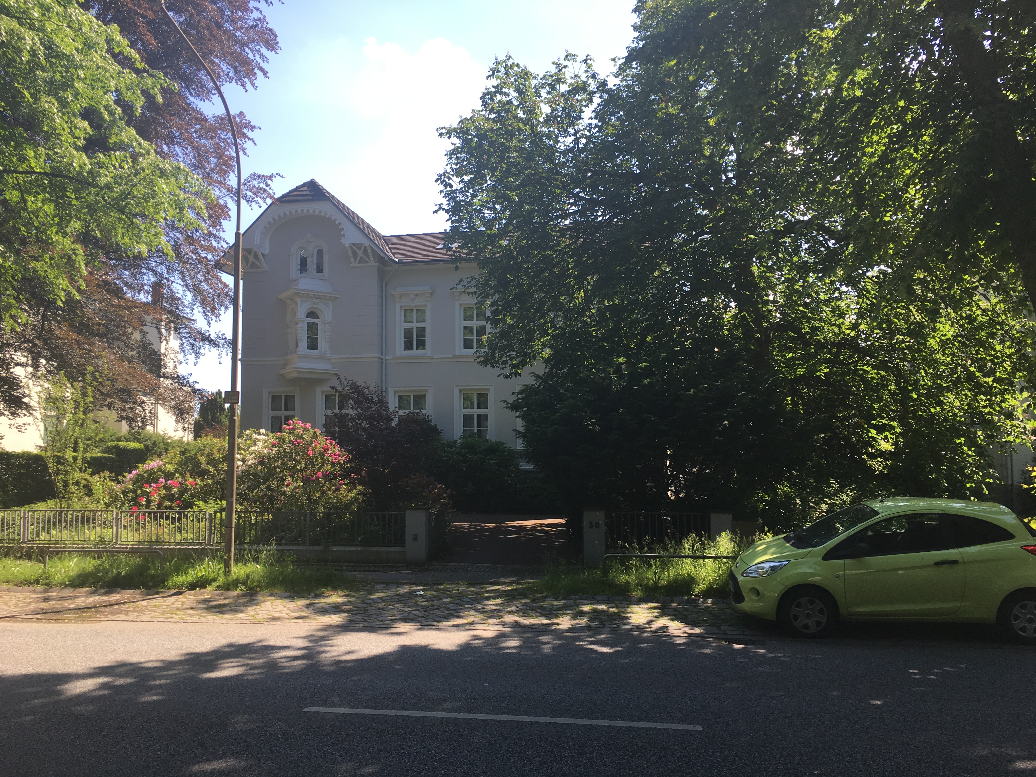 Haus Roeckstr. 30 in Lübeck